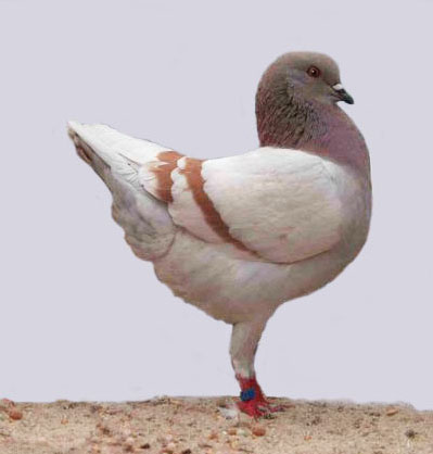 Modena, German (Mealie)